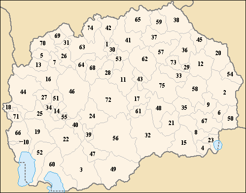 Любомир Таушанов, 2005 г.